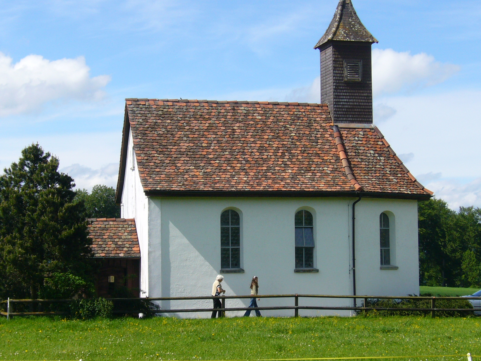 St. Antonius-Kapelle in Reutenen, Gemeinde Homburg, Kanton Thurgau, Schweiz